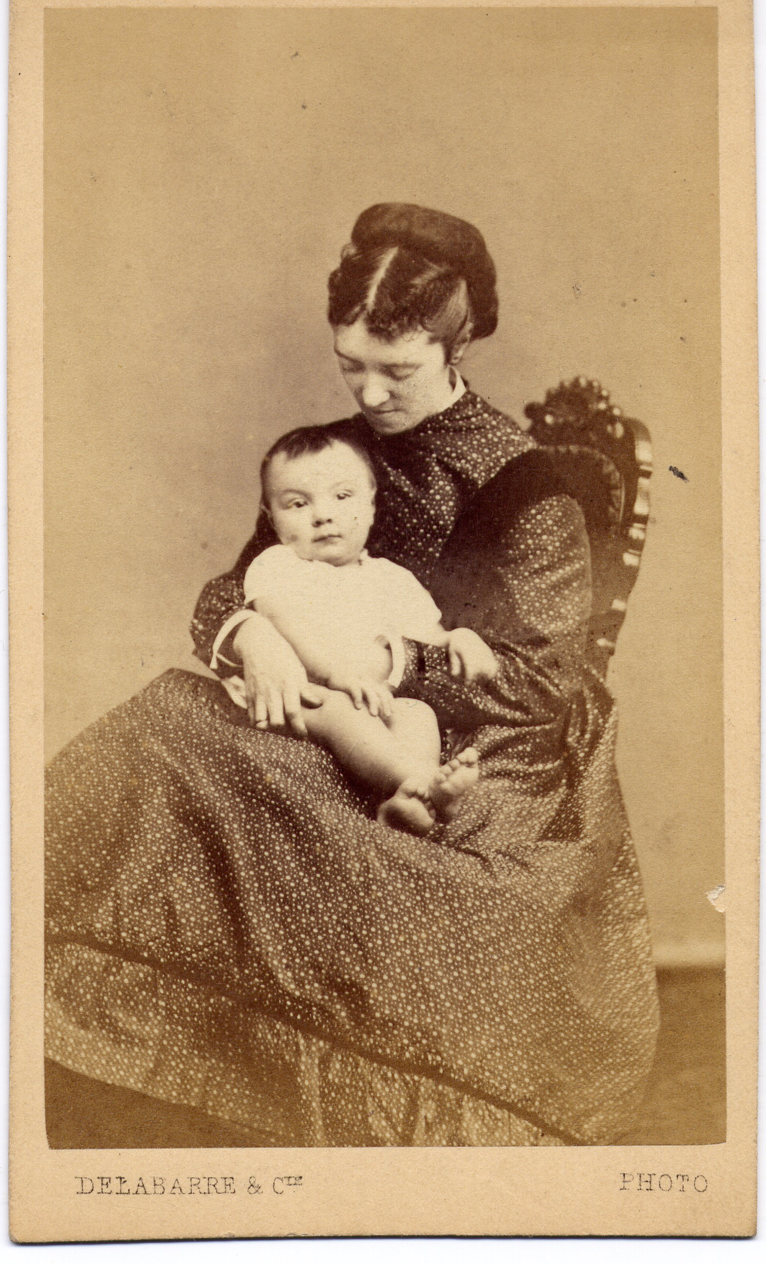 Hermine Straatman tenant dans ses bras son bébé Henri van Dievoet vers 1870.